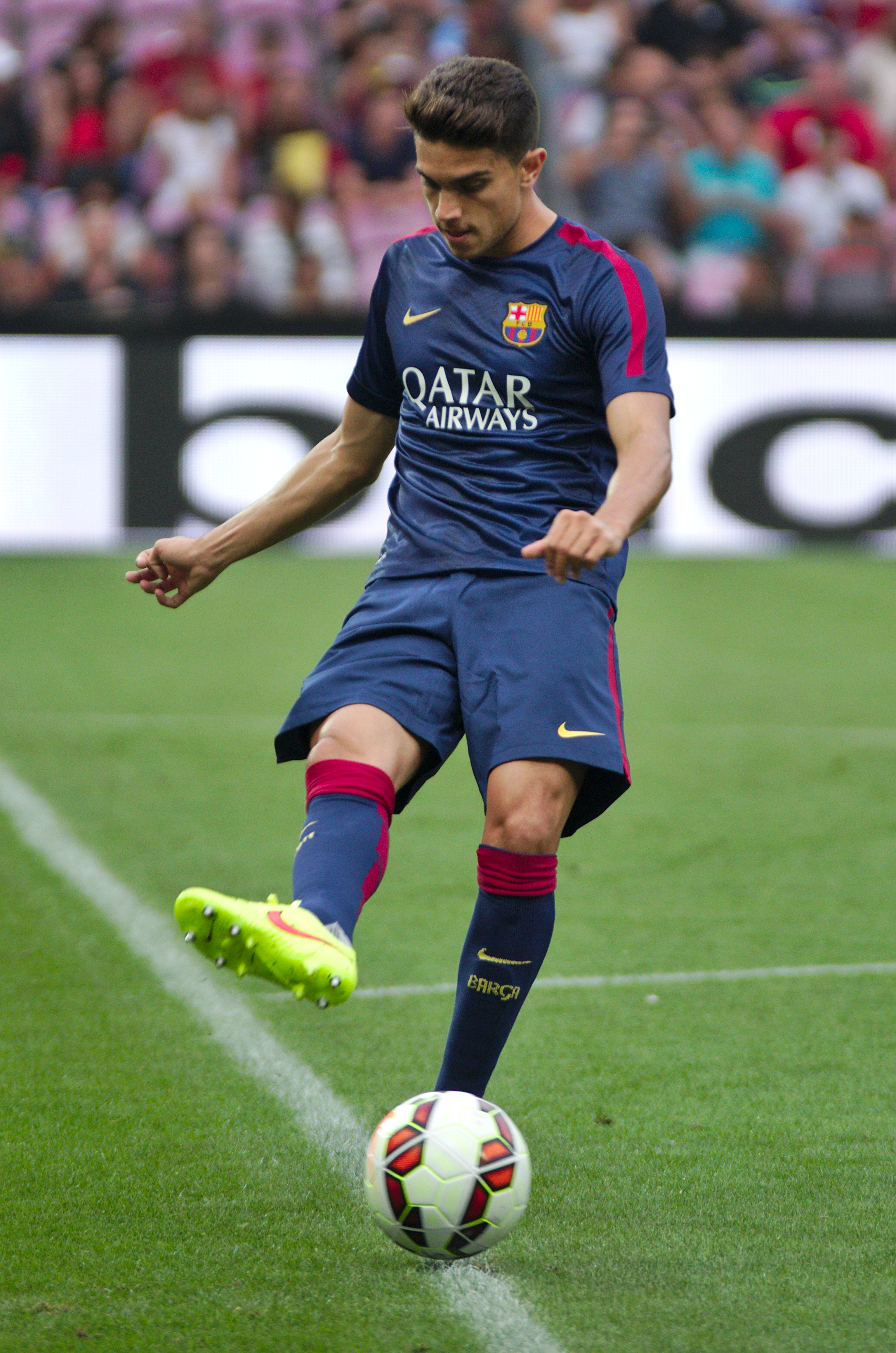 Barça - Napoli - 20140806 - Marc Bartra